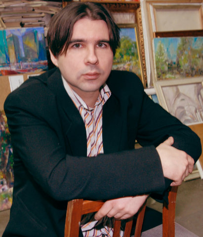 Porträtfoto